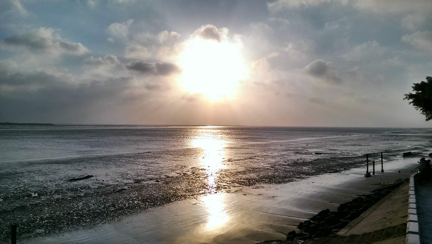 中文（台灣）: 大肚溪口野生動物保護區。龍井麗水漁港附近拍攝。